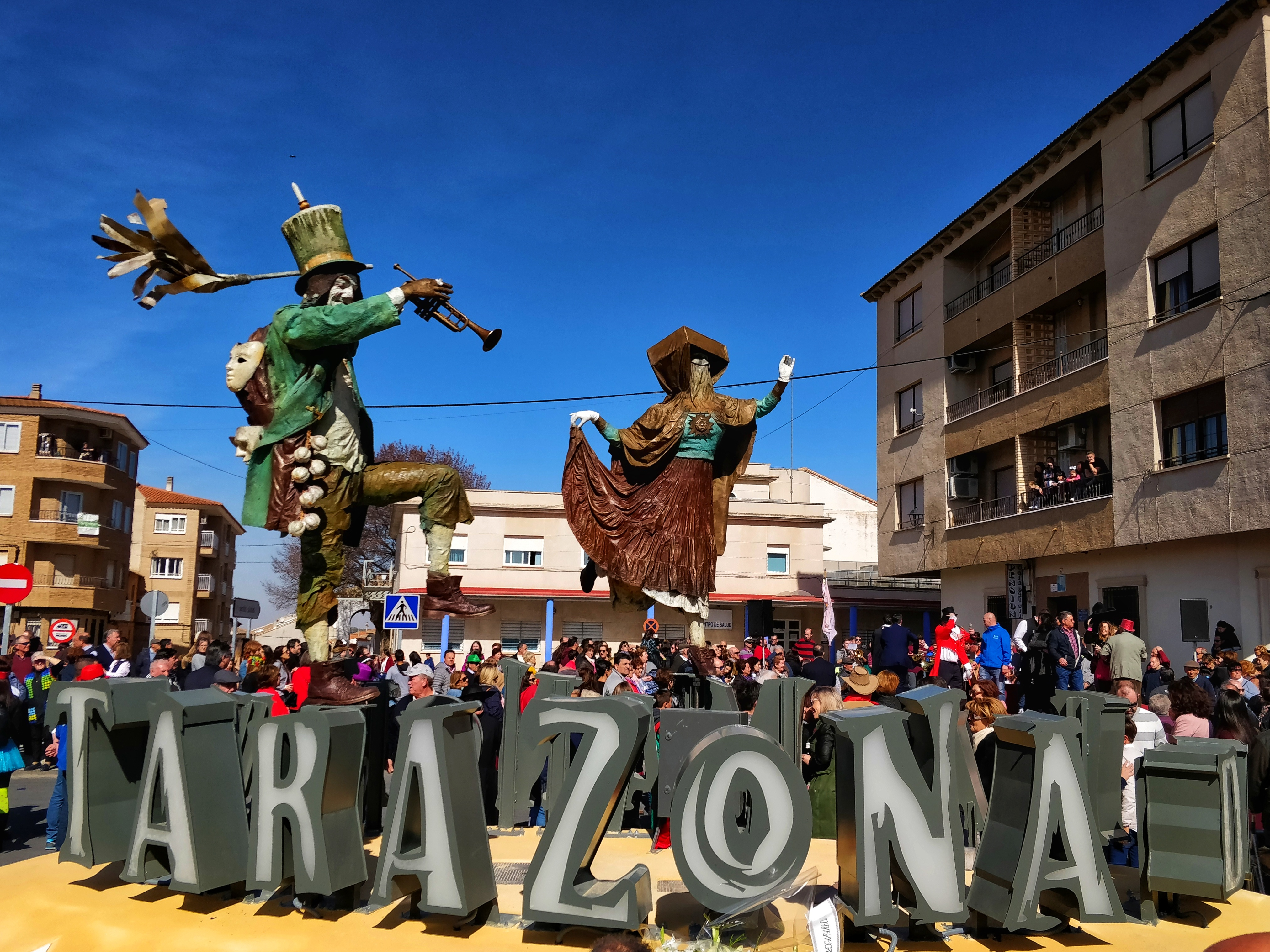 Escultura en bronce realizada por el artista albaceteño José Luis Selzo